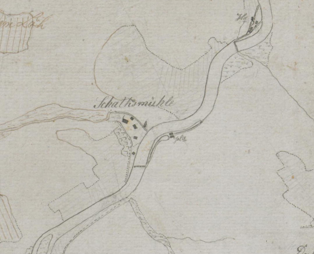 Handrisse (Mensalblätter) zur Karte der Grafschaft Mark von Eversmann um 1795 Ausschnitt Schalksmühle